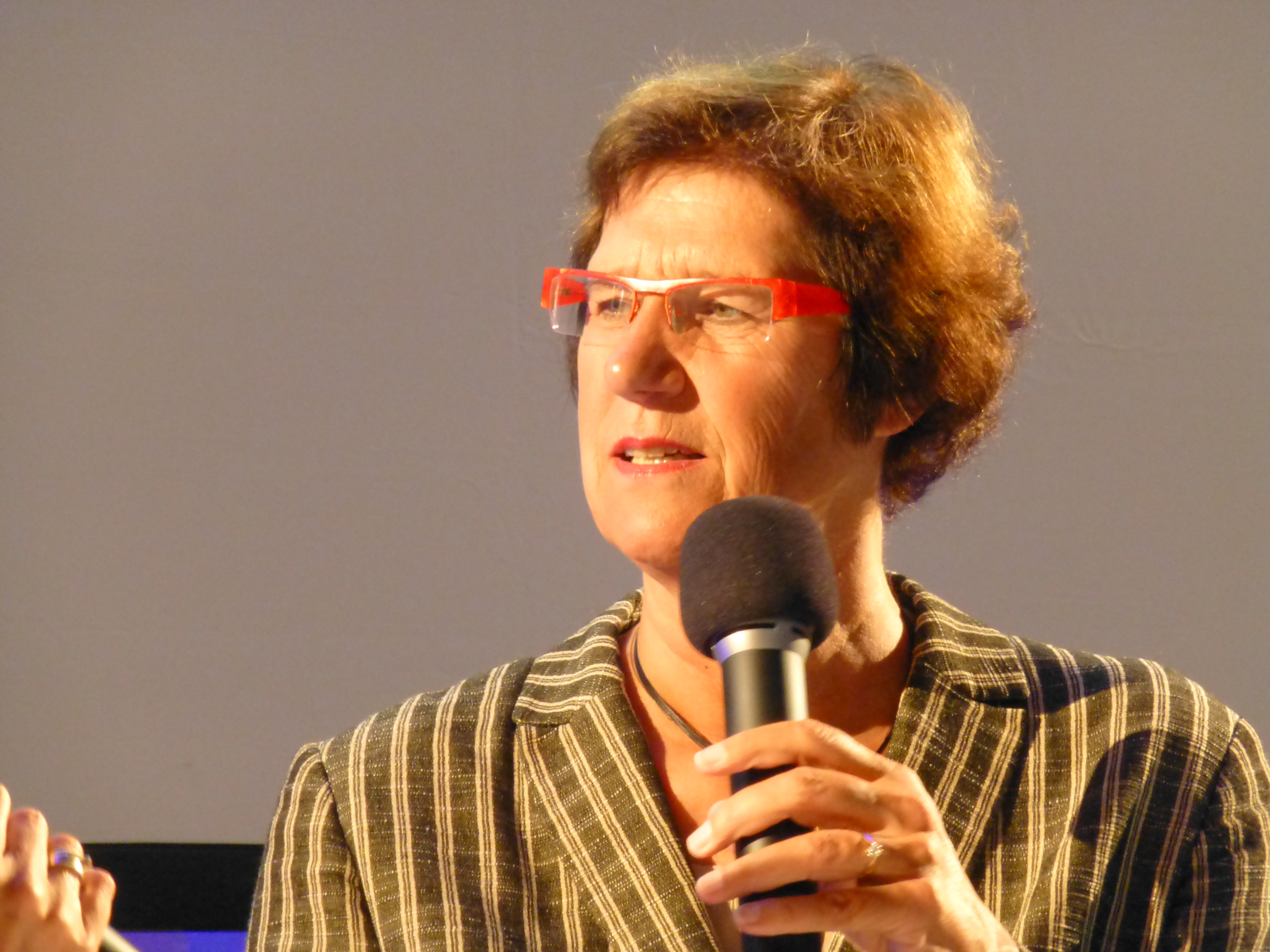 Wahlparty zur Wahl des Oberbürgermeisters am 13. September 2015 im Lichthof des Rathaus Wuppertal. Oberbürgermeister-Kandidatin Gunhild Böth (DIE LINKE).